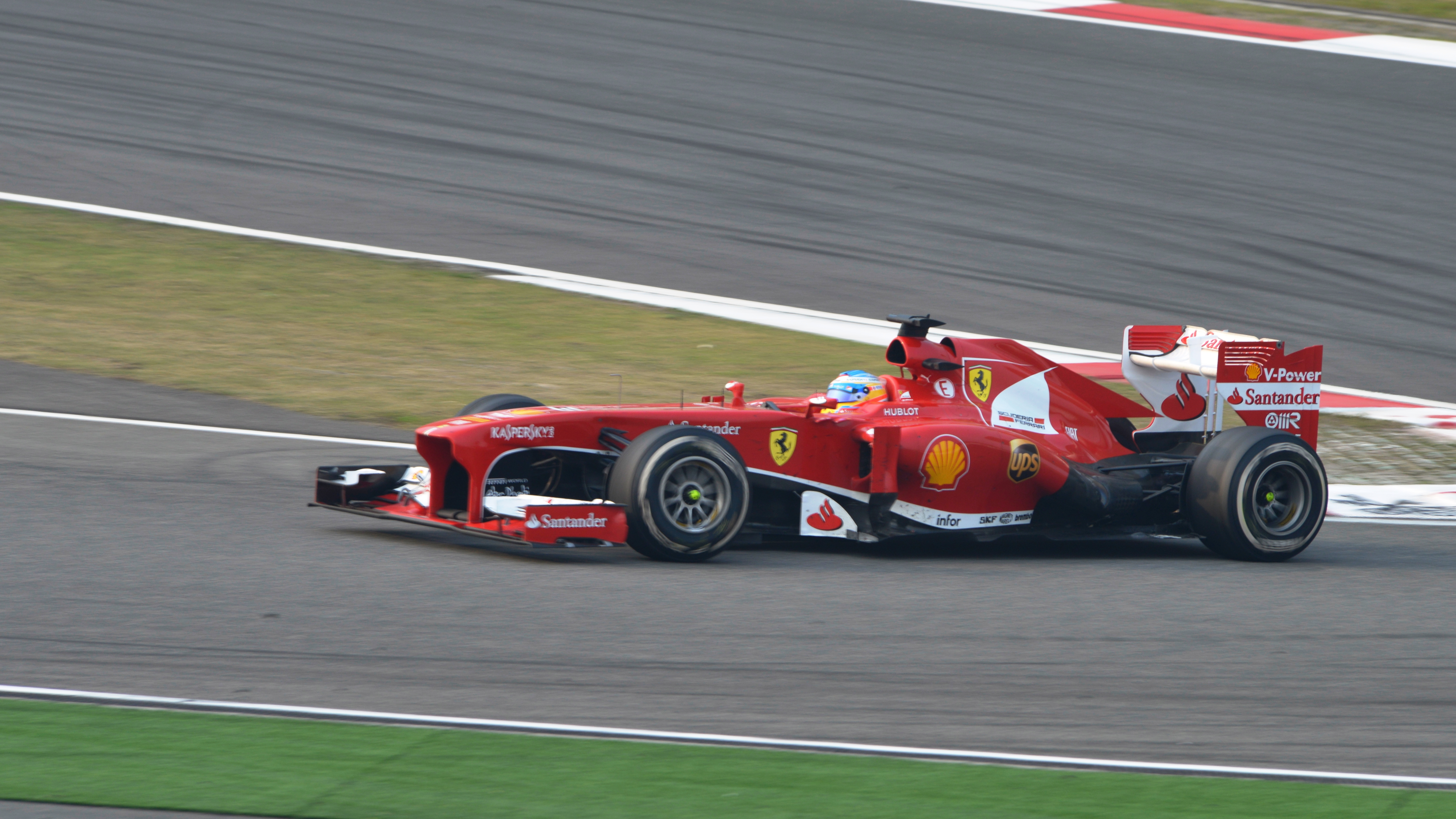 Fernando Alonso su Ferrari F138 al Gran Premio di Cina 2013